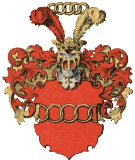 Budbergi suguvõsa aadlivapp ja Bönningshausen gen. Budbergi suguvõsa parunivapp